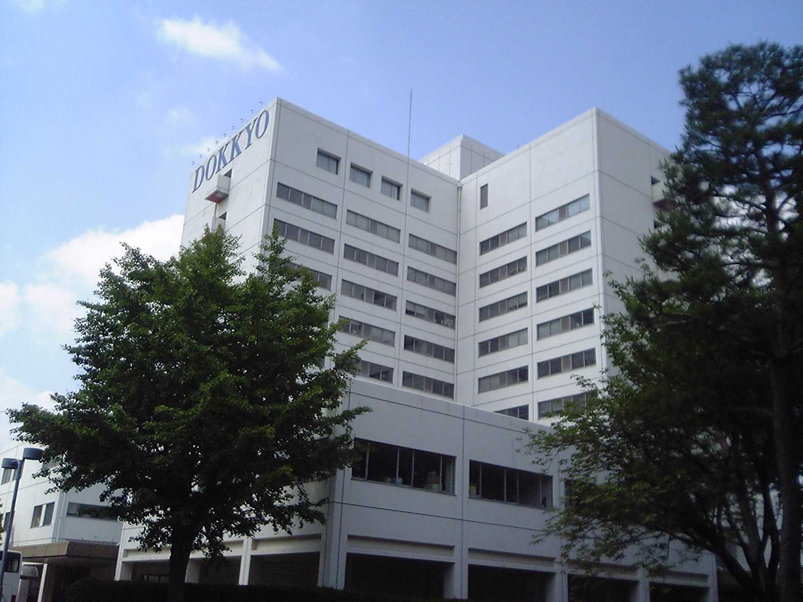 獨協大学（2007年6月3日投稿者が撮影） Category:大学の画像